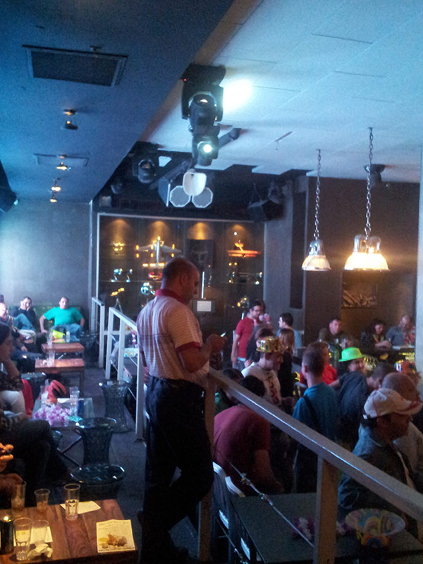 יאללה מבלים אחרת